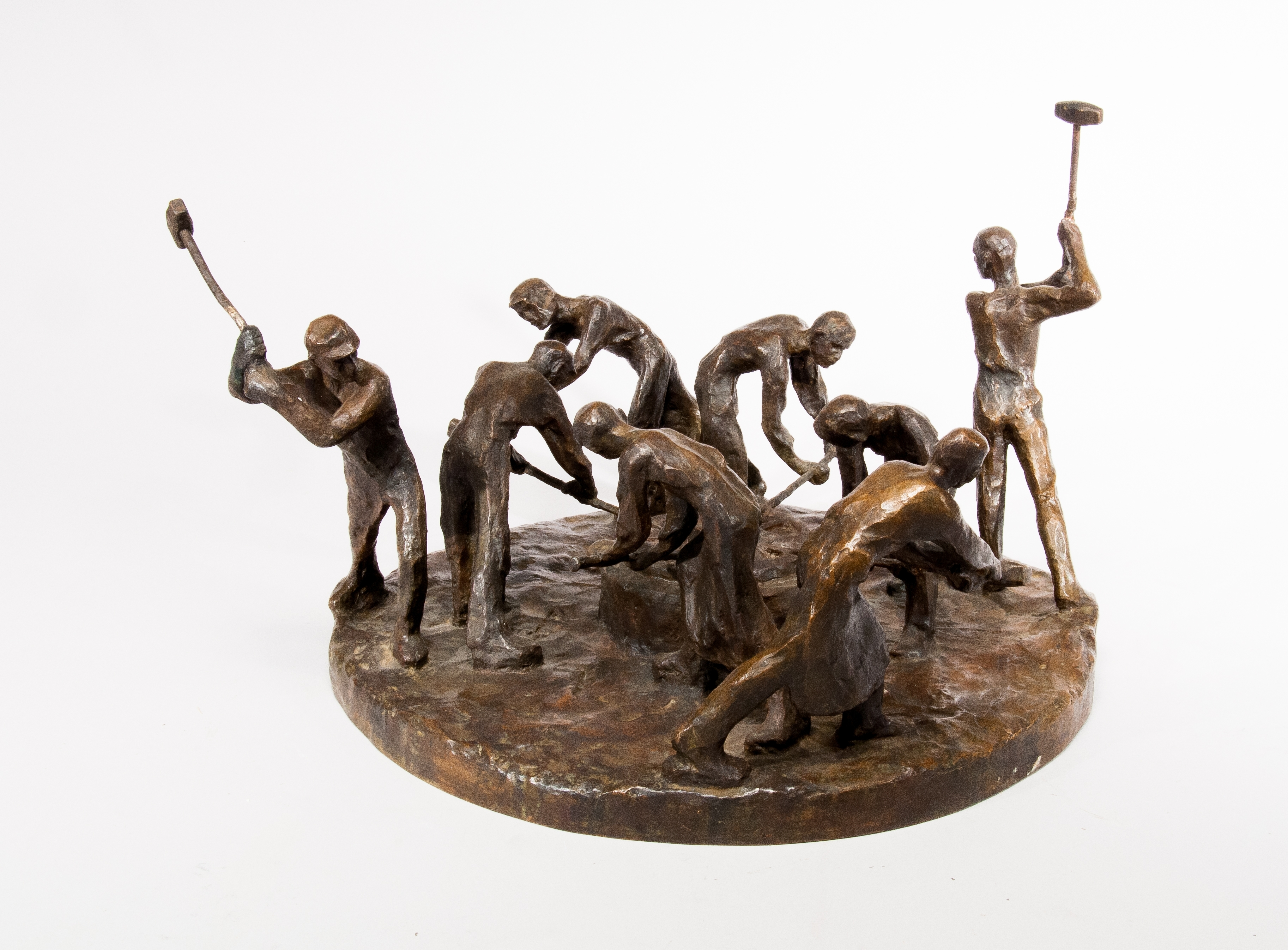 avgjutning i brons av gipsmodellen